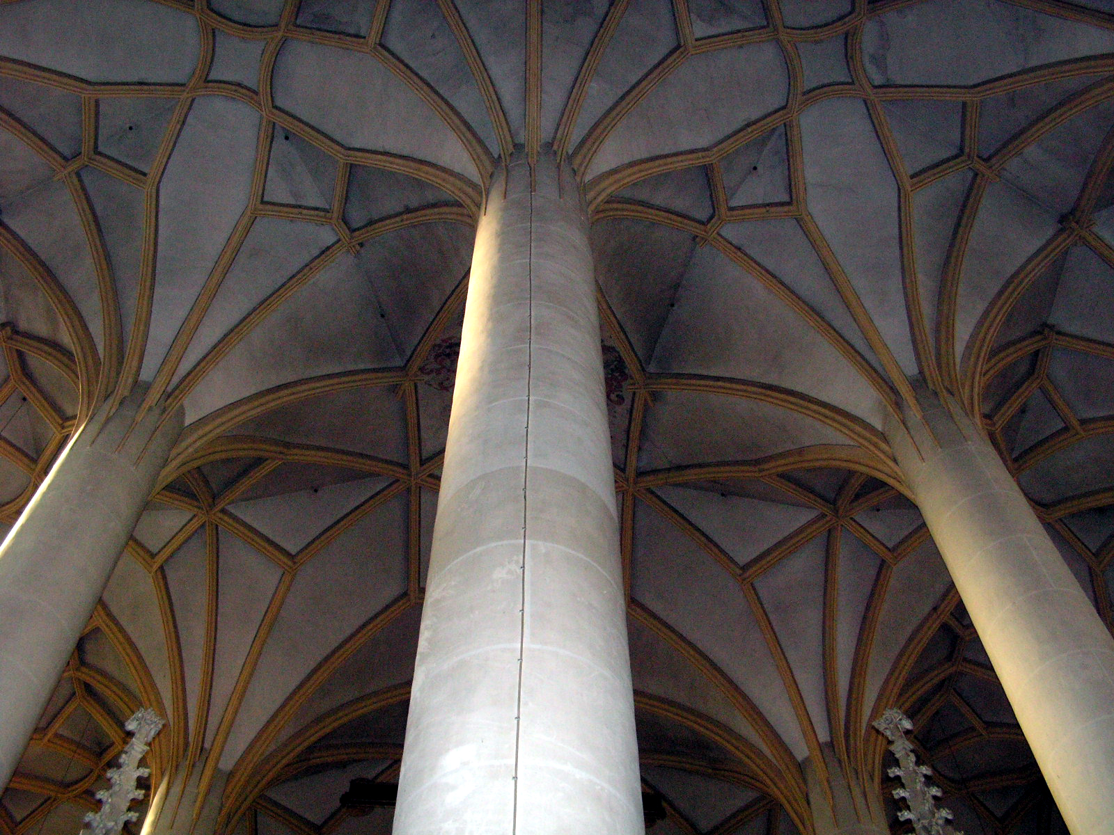 Chorgewölbe der Stadtpfarrkirche St. Johannes in Dingolfing